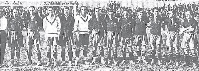 Selección española de fútbol que el 14 de abril de 1929 derrotó a la de Francia por ocho goles a uno en partido amistoso disputado en Zaragoza. Jugaron Zamora, Quesada, Quincoces, Prats, Marculena, Peña, Lazcano, Goiburu, Rubio, Bienzobas y Yurrita. El seleccionador fue José María Mateos. Aparece también en la fotografía el portero suplente, Eizaguirre.